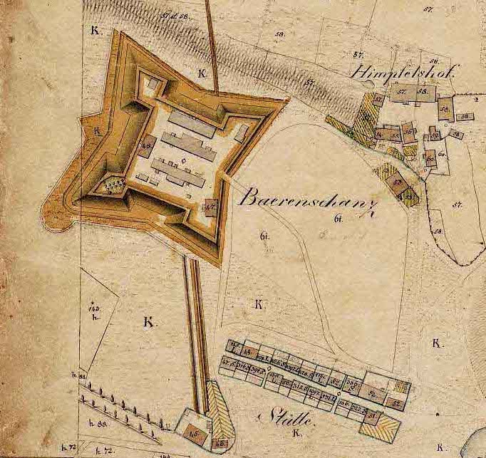 Nürnberg, Bärenschanze. Ausschnitt aus einem Plan der Steuer-Kataster-Kommission (später Katasterbureau) des Königreichs Bayern